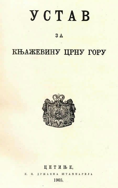 Српски (ћирилица): Устав Књажевине Црне Горе 1905